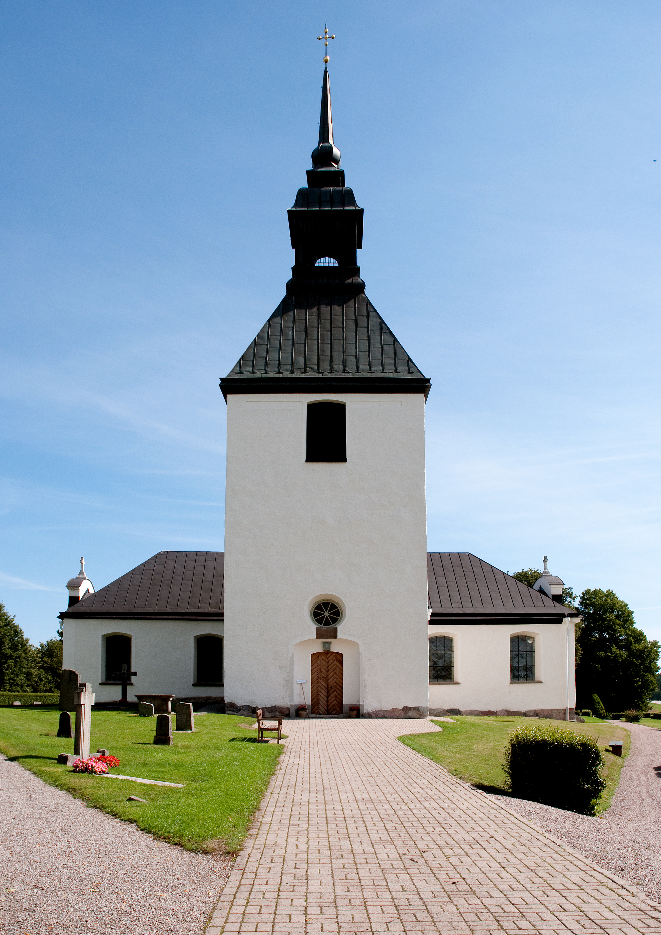 Stigtomta kyrka i Nyköpings kommun.